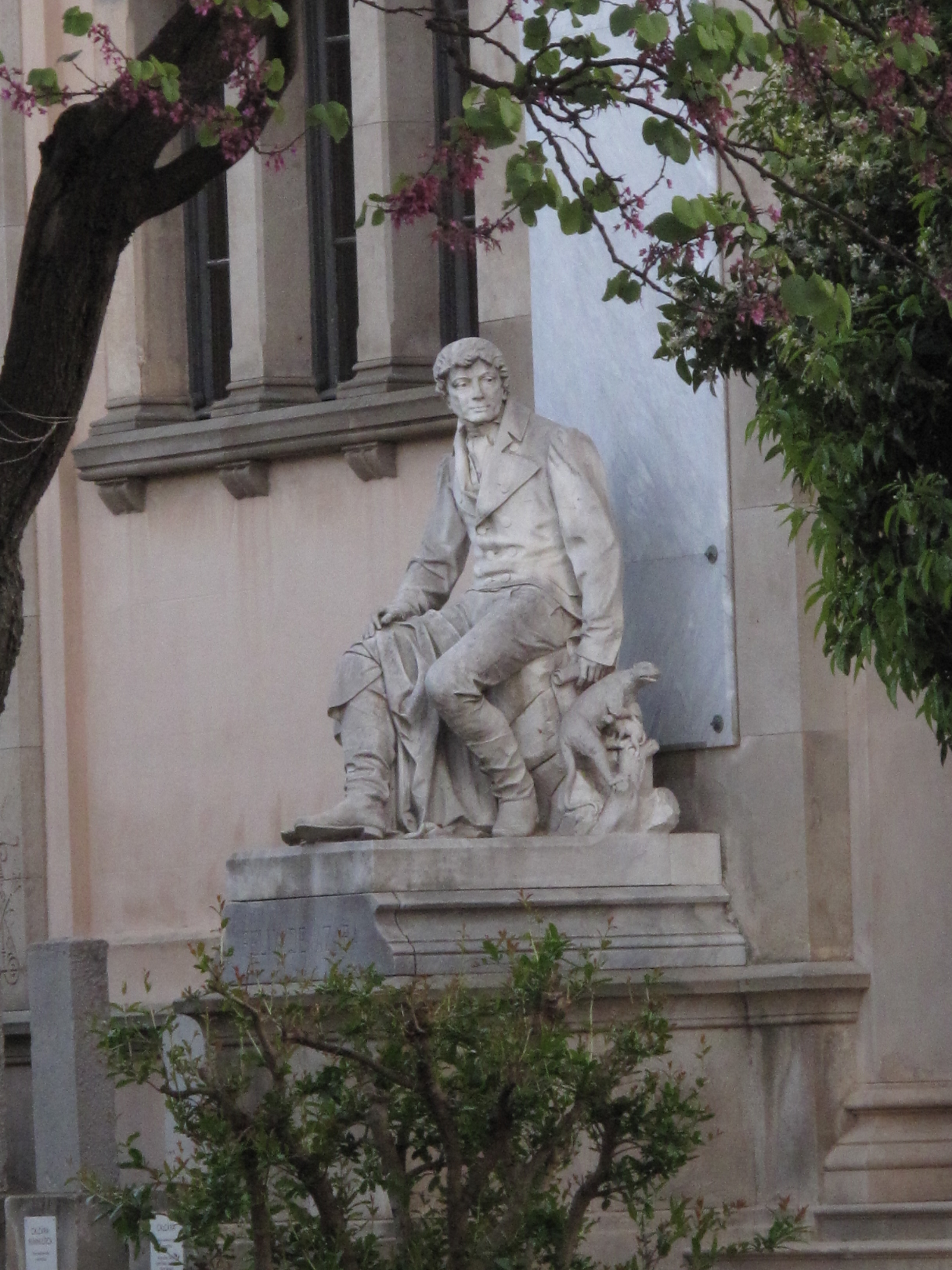 Estàtua del naturalista Félix de Azara, d'Eduard Alentorn, a l'entrada del Museu Martorell de geologia. Parc de la Ciutadella, Barcelona.